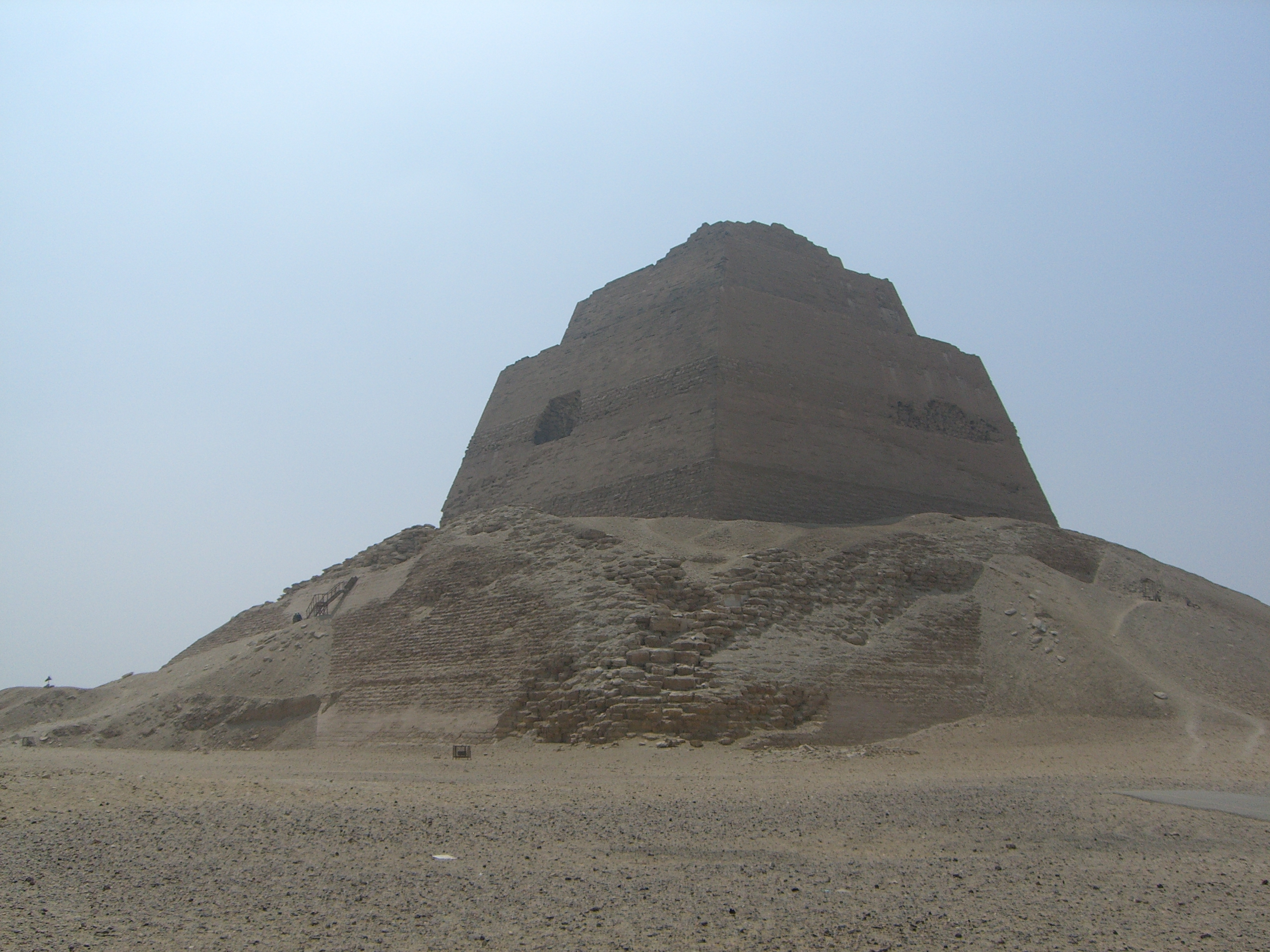 Vue de l'angle nord-ouest de la pyramide de Meïdoum.